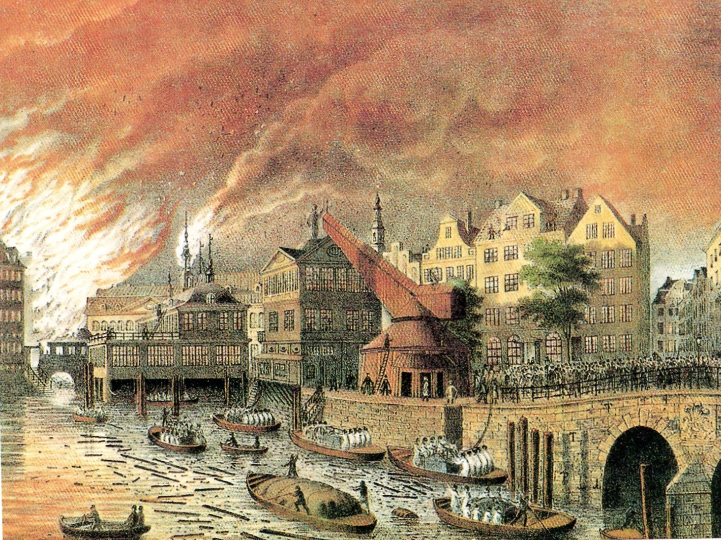 Gemälde Großer Brand in Hamburg 1842 von Peter Suhr